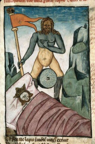 Songe de Nabuchodonosor: la statue composite. Ars moriendi. Marseille - BM - ms. 0089 (f. 012)